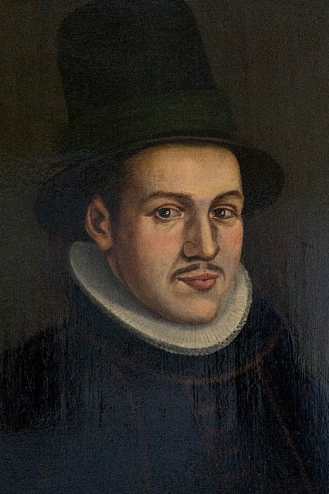 Dominee Johannes Switterieus, gereformeerd predikant te Nijkerk 1594-1633.